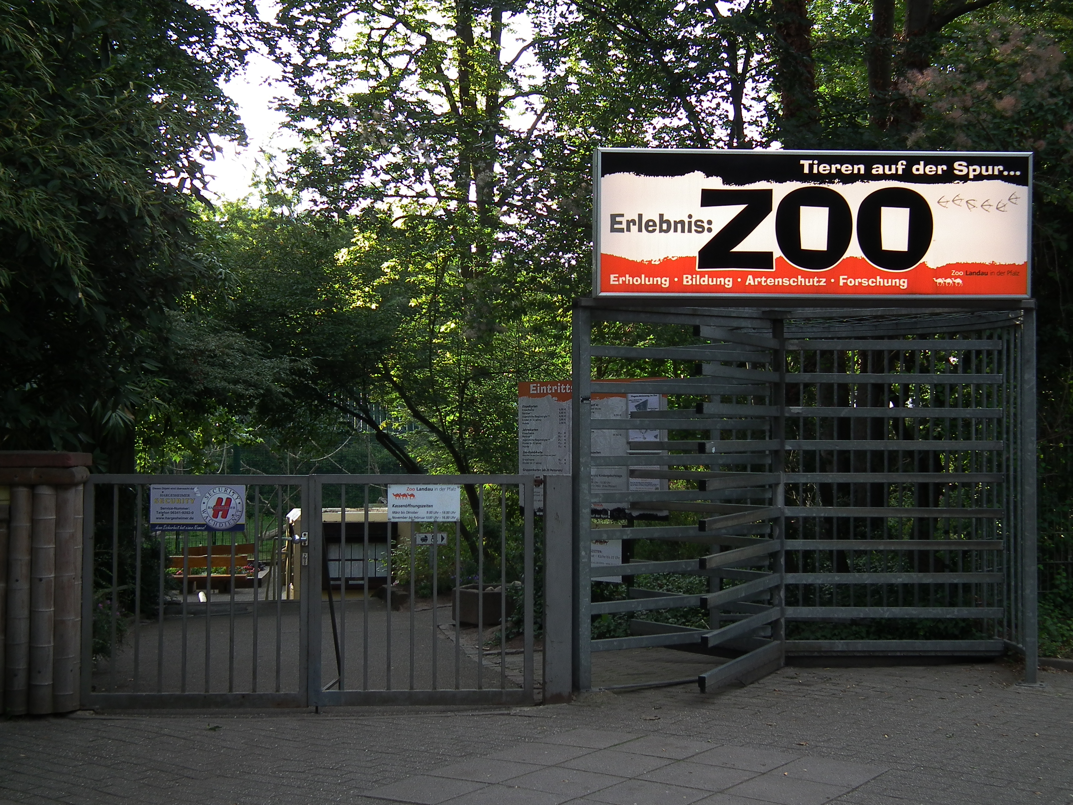 Eingang zum Zoo Landau (Rheinland-Pfalz, Deutschland)